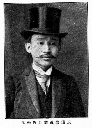 許世英肖像